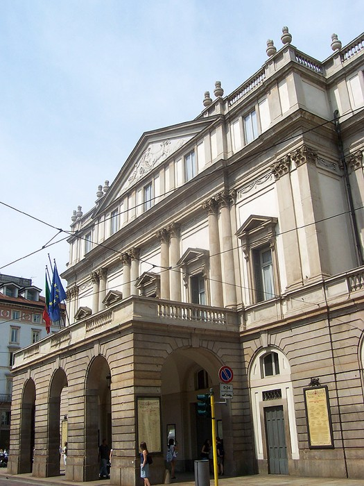 Milano - Teatro alla Scala